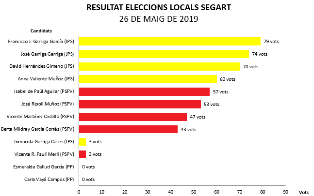 Resultat de les eleccions locals del 26 de maig de 2019 al municipi valencià de Segart